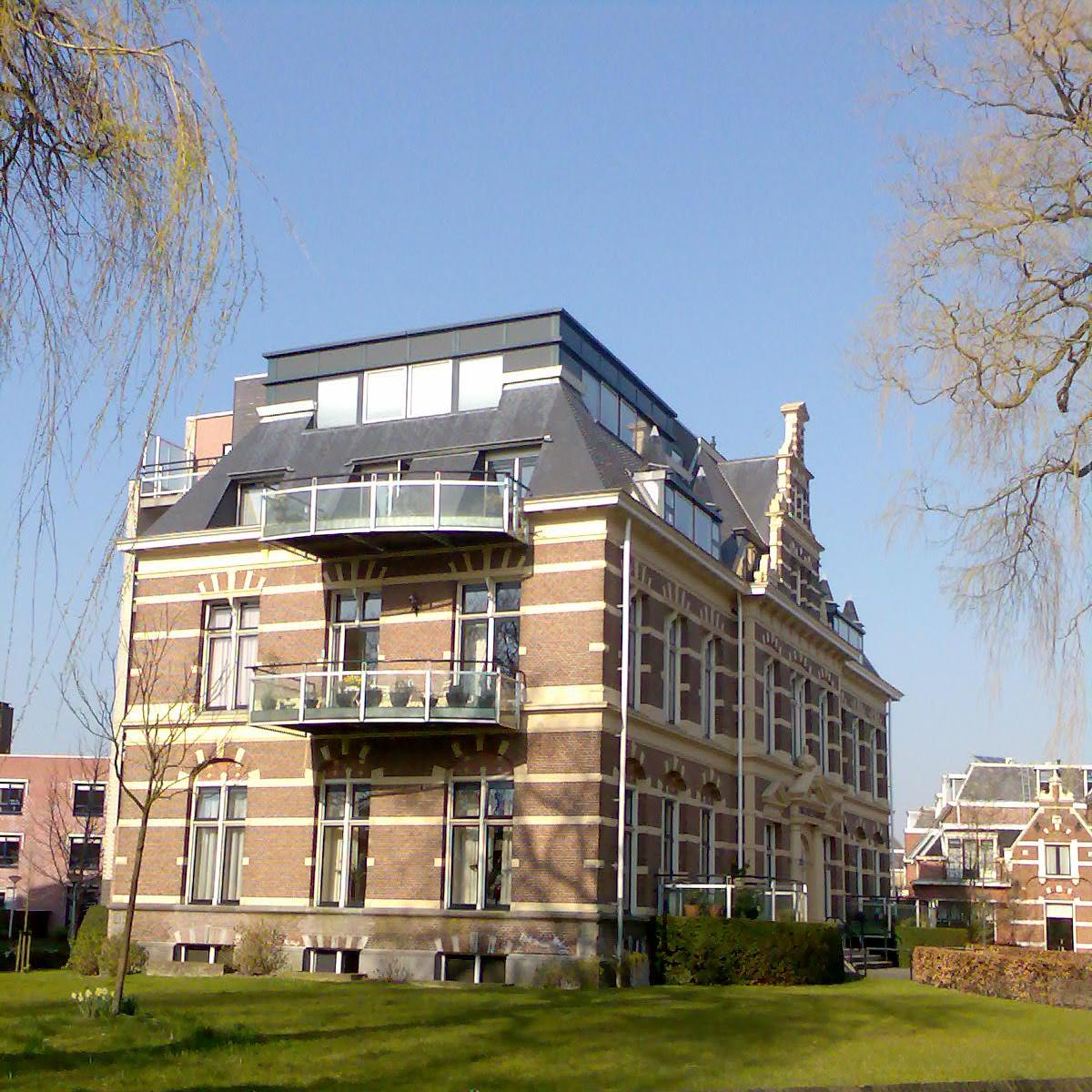 PD door eigen werk